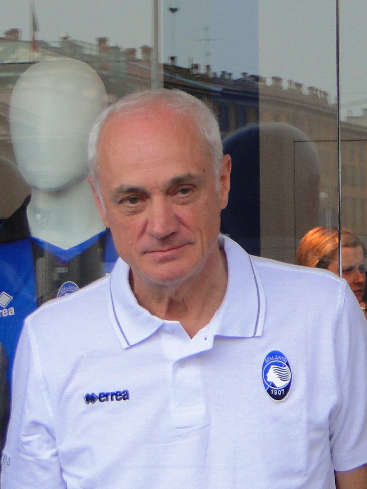 Antonio Percassi, imprenditore e presidente dell'Atalanta B.C.